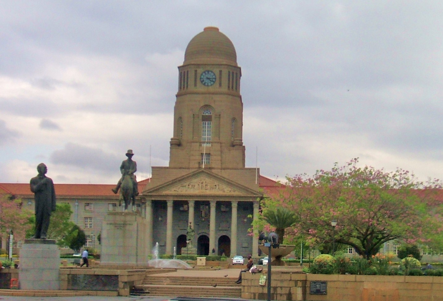 Pretoria Afrique_australe au Afrique du Sud